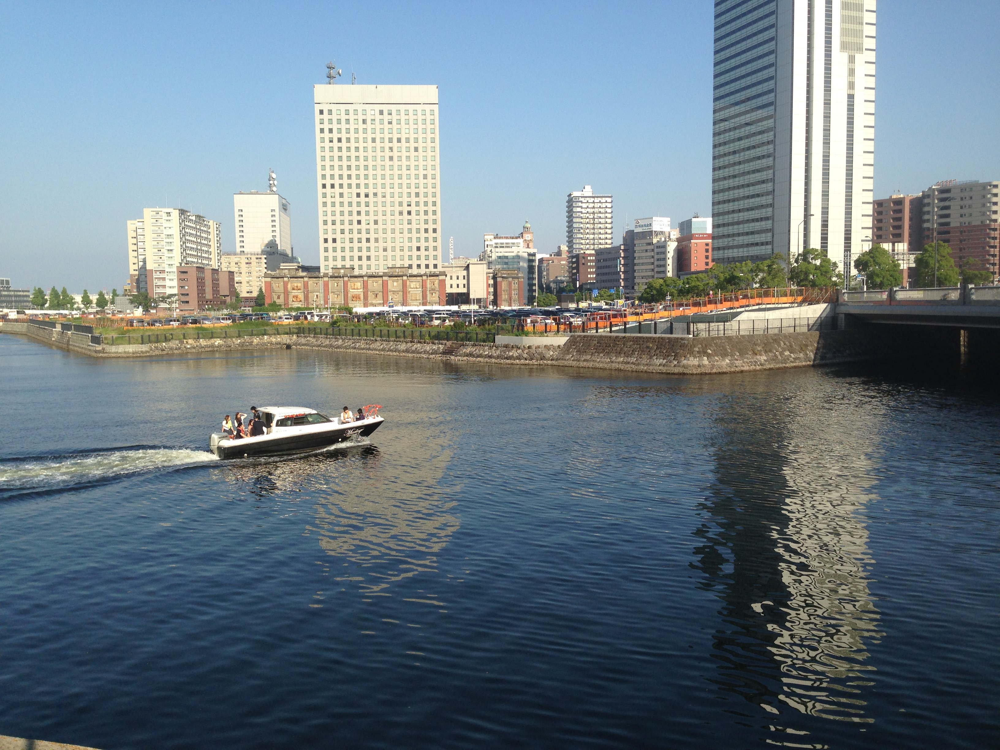 北仲橋の北東側には横浜市に残る最古の河川護岸がある。ここには大岡橋梁台跡と開港時に設置された灯台跡がある。